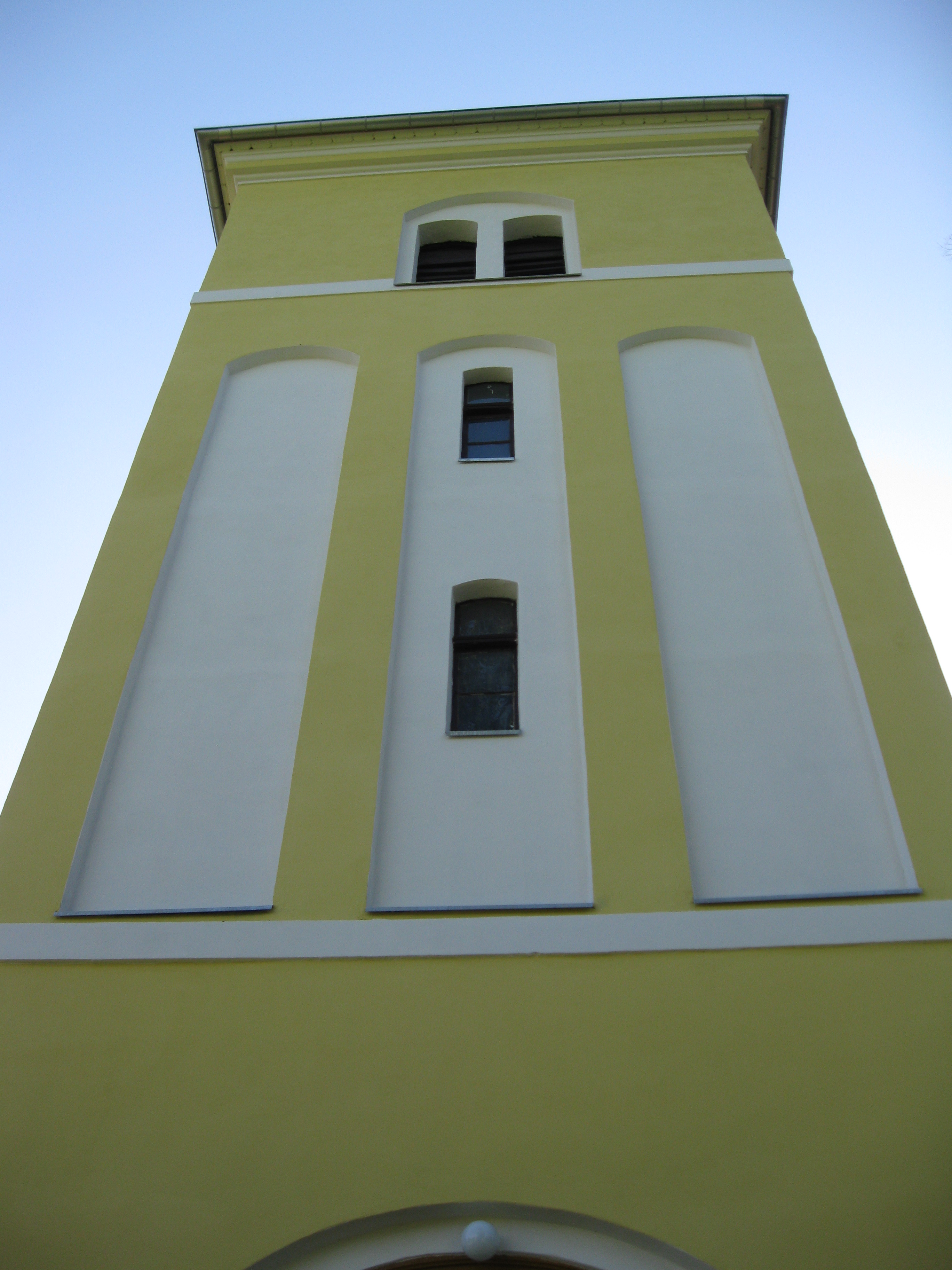 zespół kościoła ewangelickiego ob. par. rzym.-kat. p.w. Św. Trójcy kościół ewangelicki cmentarz przy kościele ewangelickim Budry, Budry